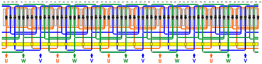 Wicklungstopologie einer verteilten Wicklung